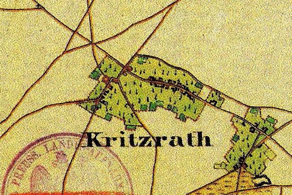 Preußische Kartenaufnahme 1846 -Uraufnahme- (Gangelt)